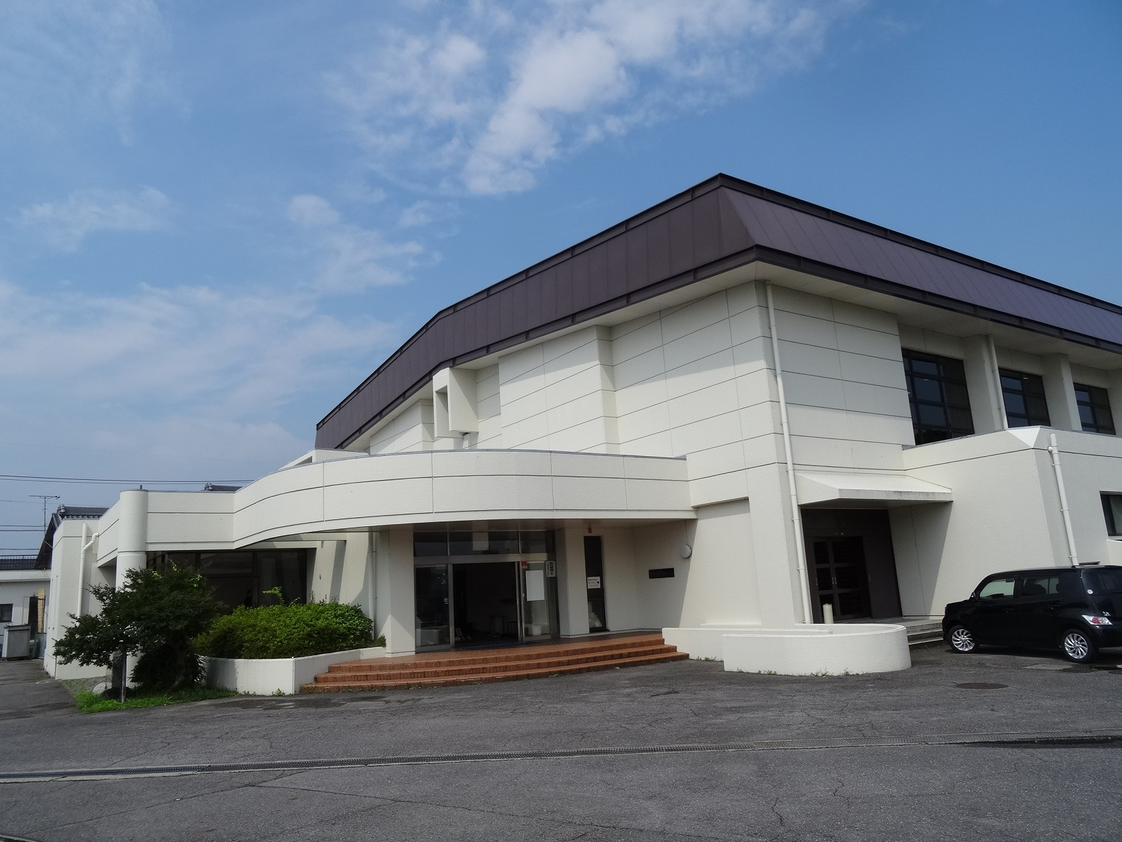 岡崎勤労者体育センター（岡崎市下青野町）